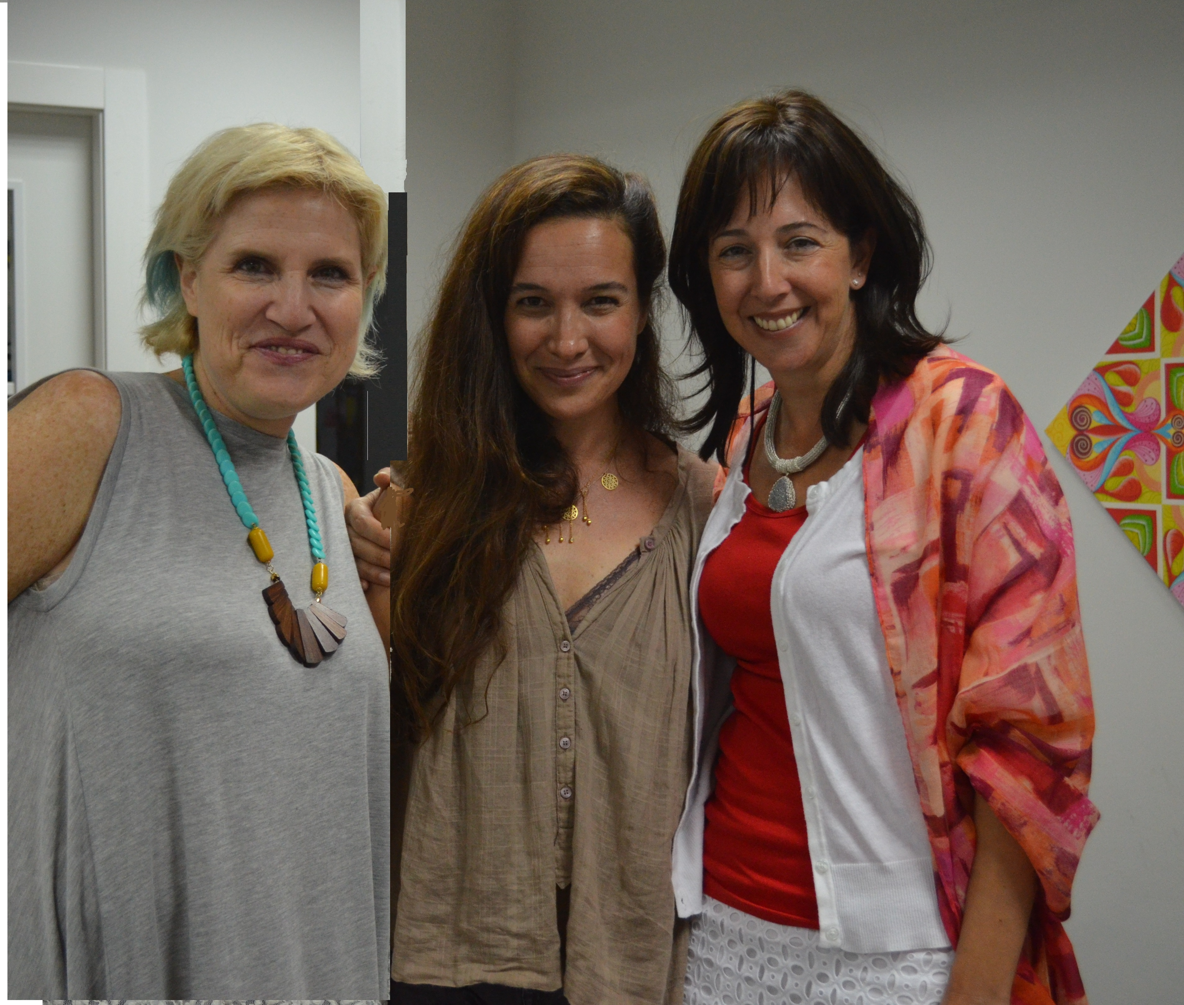 מימין לשמאל: ג'ואל אקשטיין מהקרן לידידות, יעל אבקסיס, נשיאת העמותה עד 2015, שרון שפירא, עובדת בעמותה.